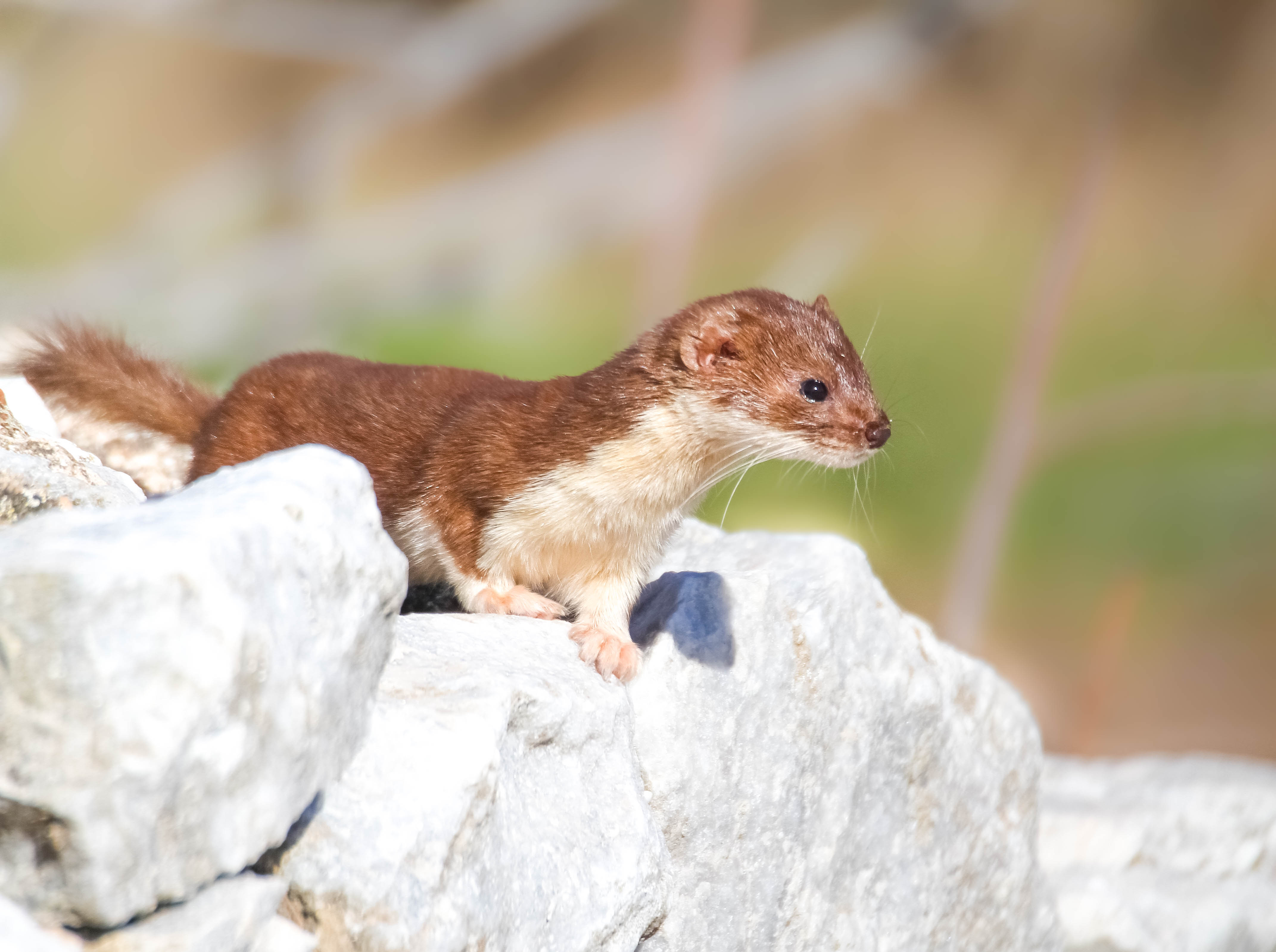 Η νυφιτσα ειναι ενα απ τα σπανια ειδη στην Αττικη, μερος της σημαντικης βιοποικιλοτητας του εθνικου παρκου Σχινια Μαραθωνα This is a photography of Natura 2000 protected area with ID GR3000003